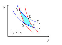 Diagrama PV para o Ciclo de Carnot